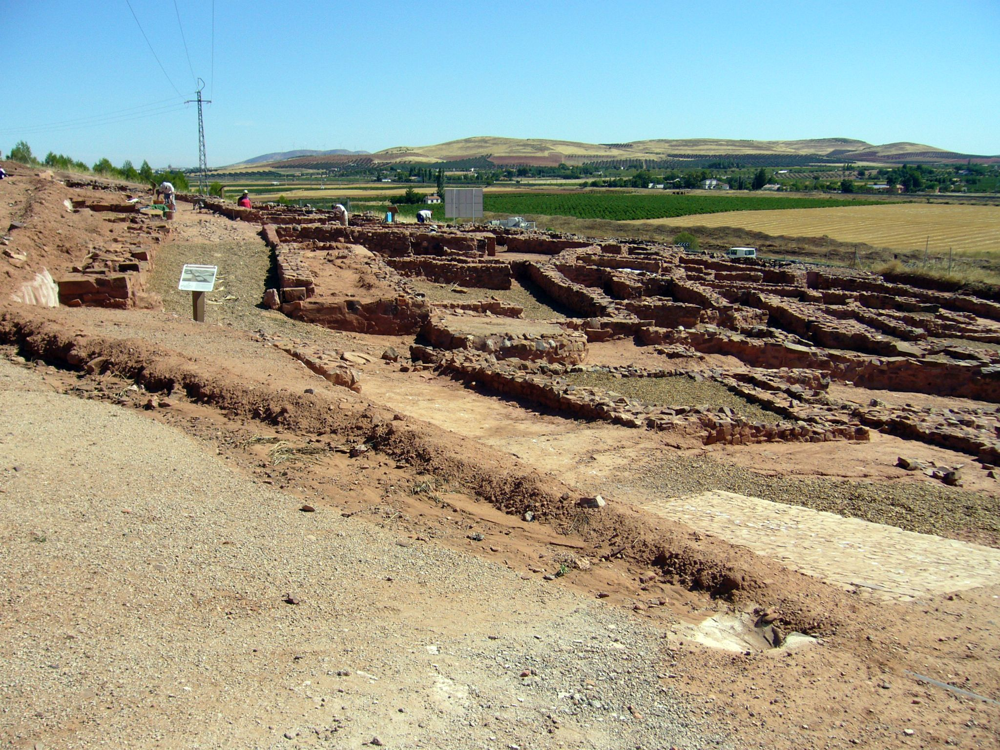 Vista de una de las partes consolidadas de la excavación arqueológica del Cerro de las Cabezas, en las proximidades de Valdepeñas (Ciudad Real) España. Se puede apreciar una de las calles principales (en diagonal desde la derecha hacia la izquierda en forma ascendente) y varias construcciones alrededor de la misma.